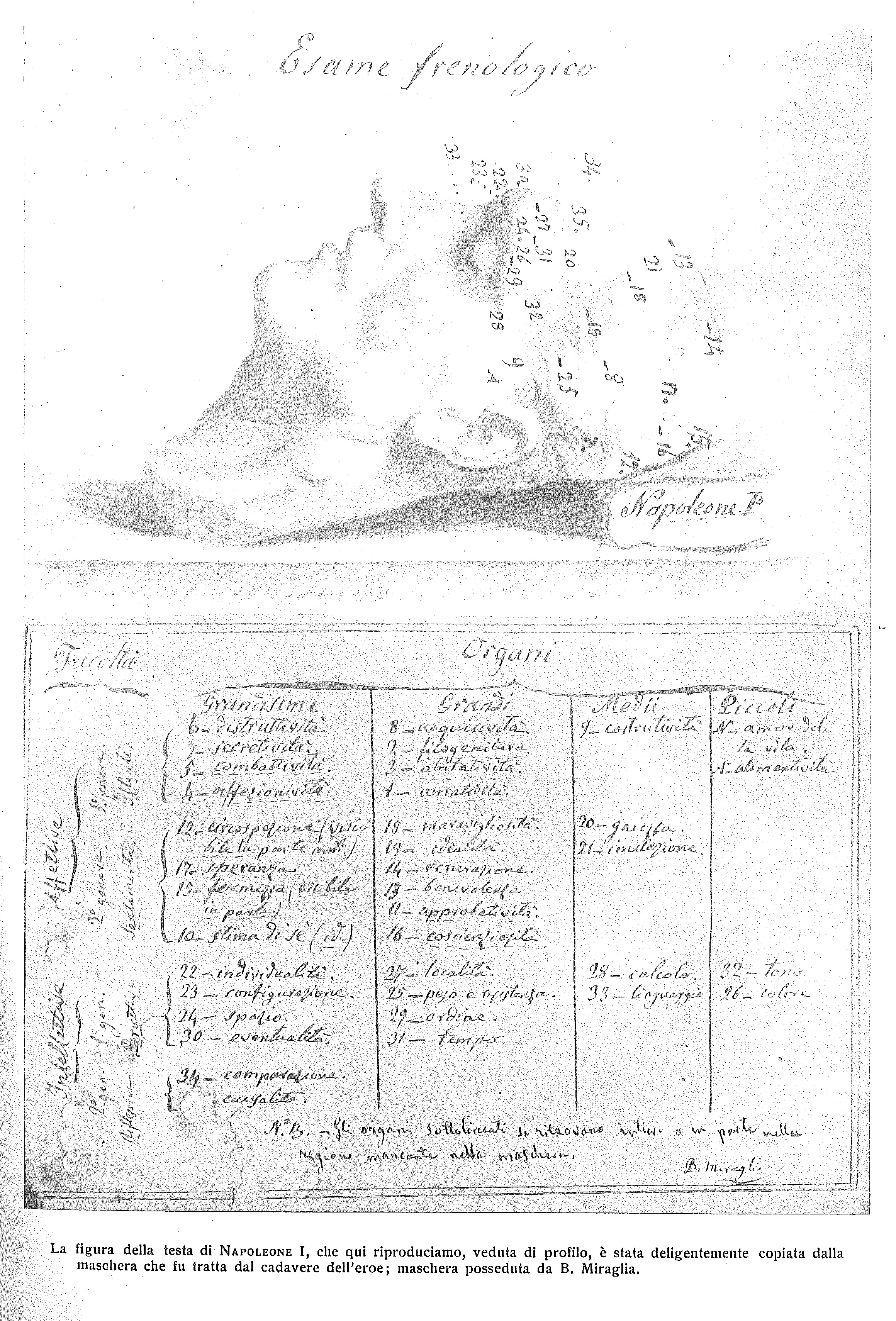 Figura della testa di Napoleone I con appunti del celebre frenologo italiano Biagio Gioacchino Miraglia